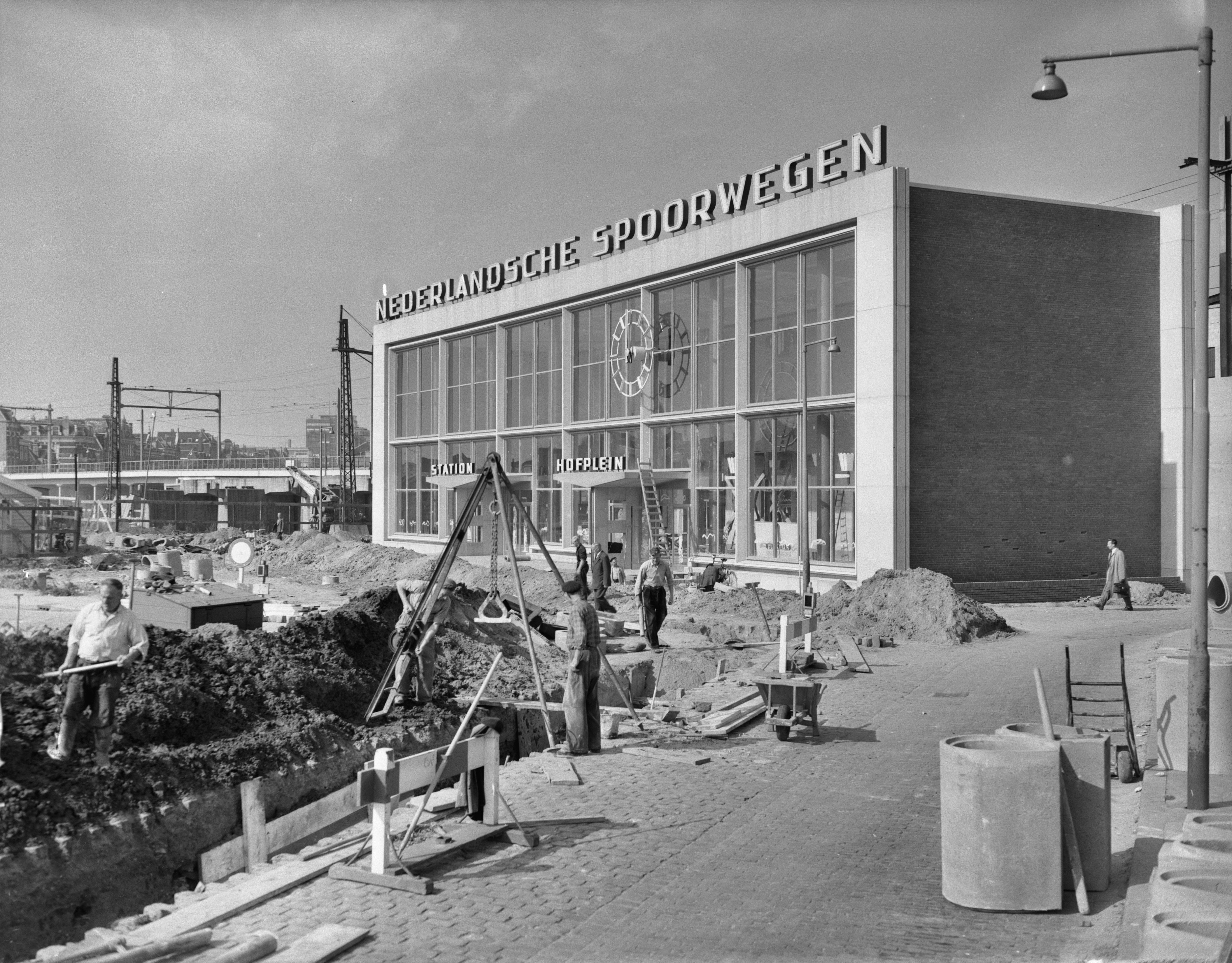 Collectie / Archief : Fotocollectie Anefo Reportage / Serie : [ onbekend ] Beschrijving : Bouw Station Hofplein Rotterdam Datum : 9 oktober 1956 Locatie : Rotterdam, Zuid-Holland Trefwoorden : bouwactiviteiten, spoorwegen, stations Fotograaf : Rossem, Wim van / Anefo Auteursrechthebbende : Nationaal Archief Materiaalsoort : Negatief (zwart/wit) Nummer archiefinventaris : bekijk toegang 2.24.01.04 Bestanddeelnummer : 908-0556